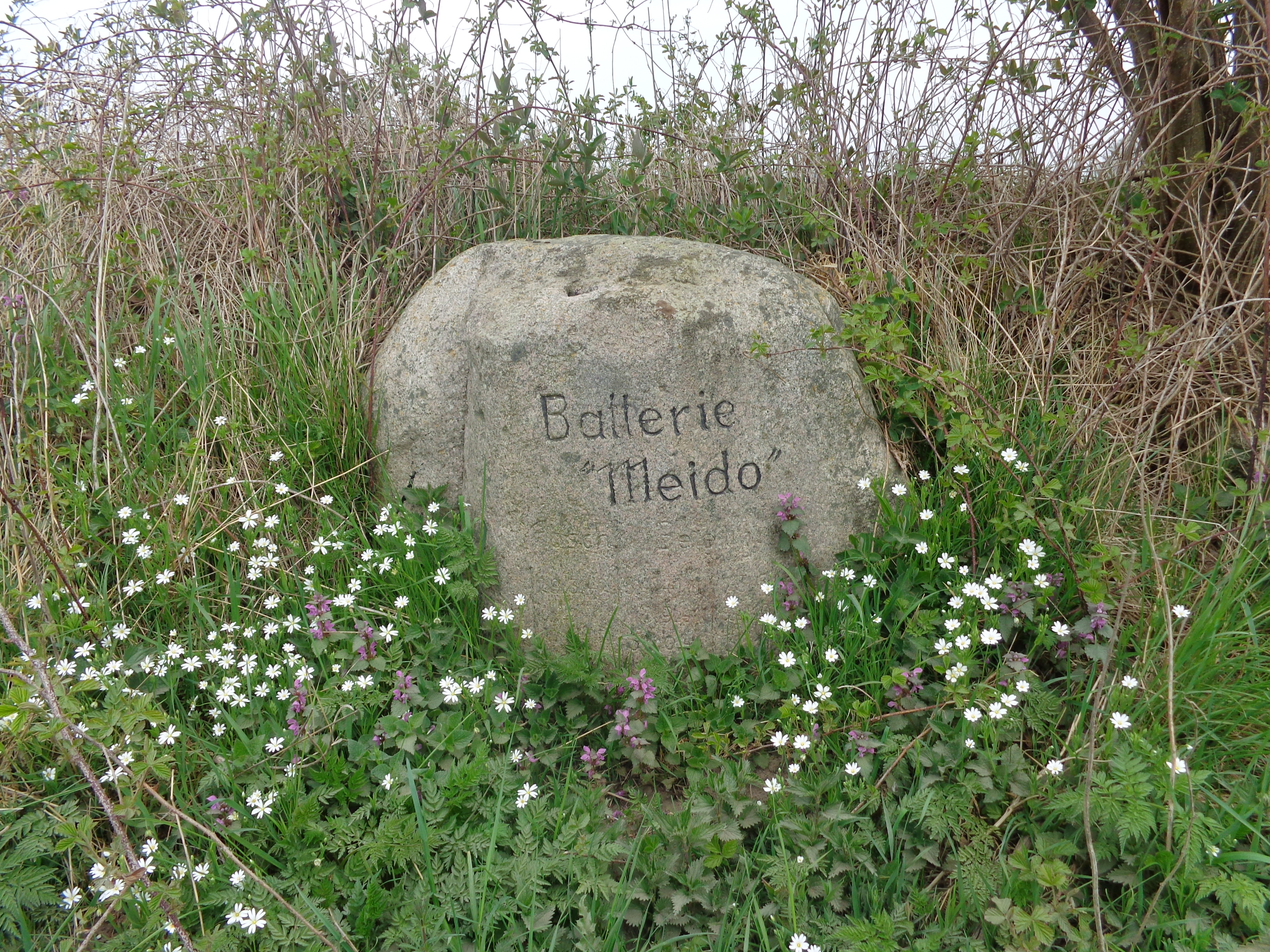 Gedenkstein der Marine-Flak in Meimersdorf